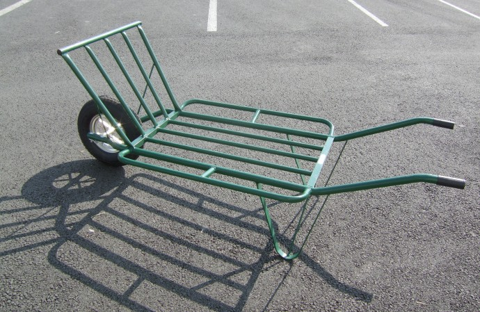 Mem-farita foto.Ssire